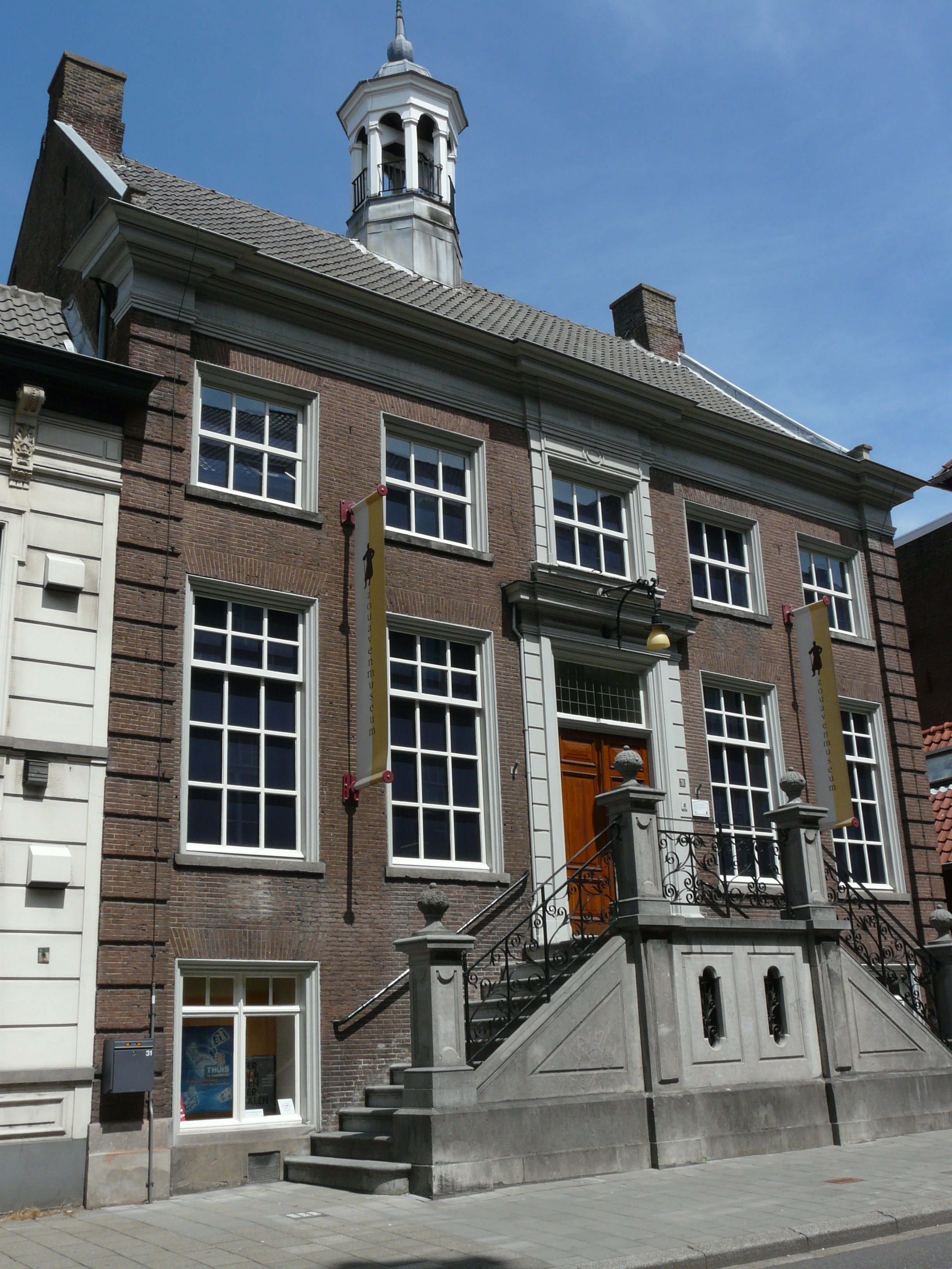 Zouavenmuseum en voormalig raadhuis aan de Markt in Oudenbosch